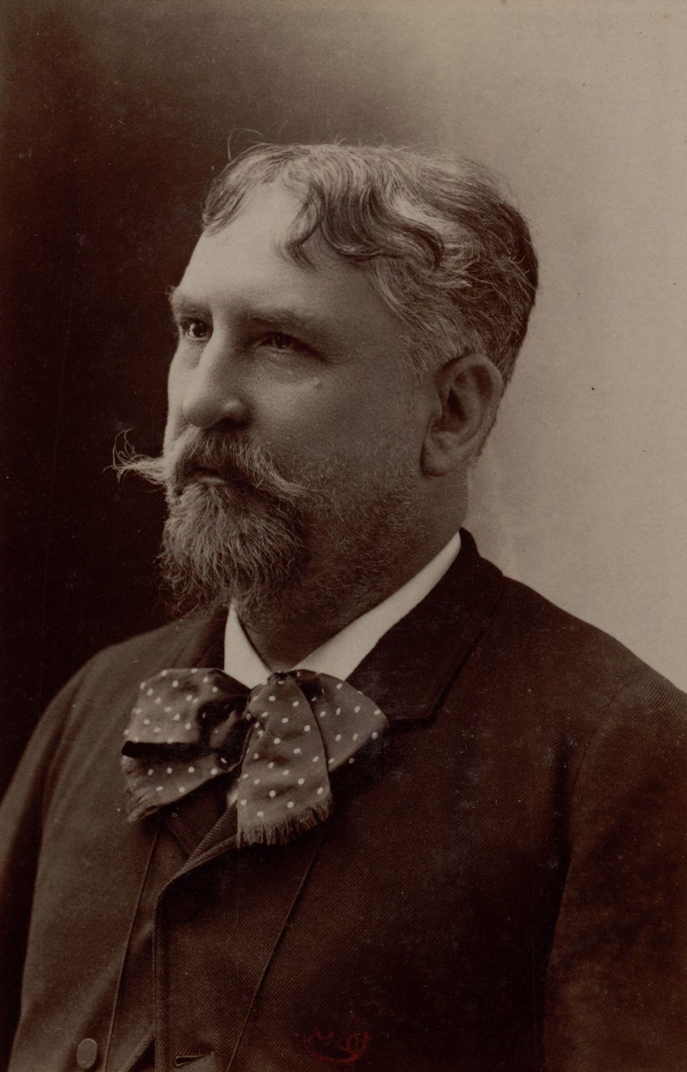 Charles de Courcy, photographie (atelier Nadar) de 1910.